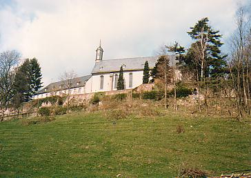 heutiges Abtei Stift Neuburg